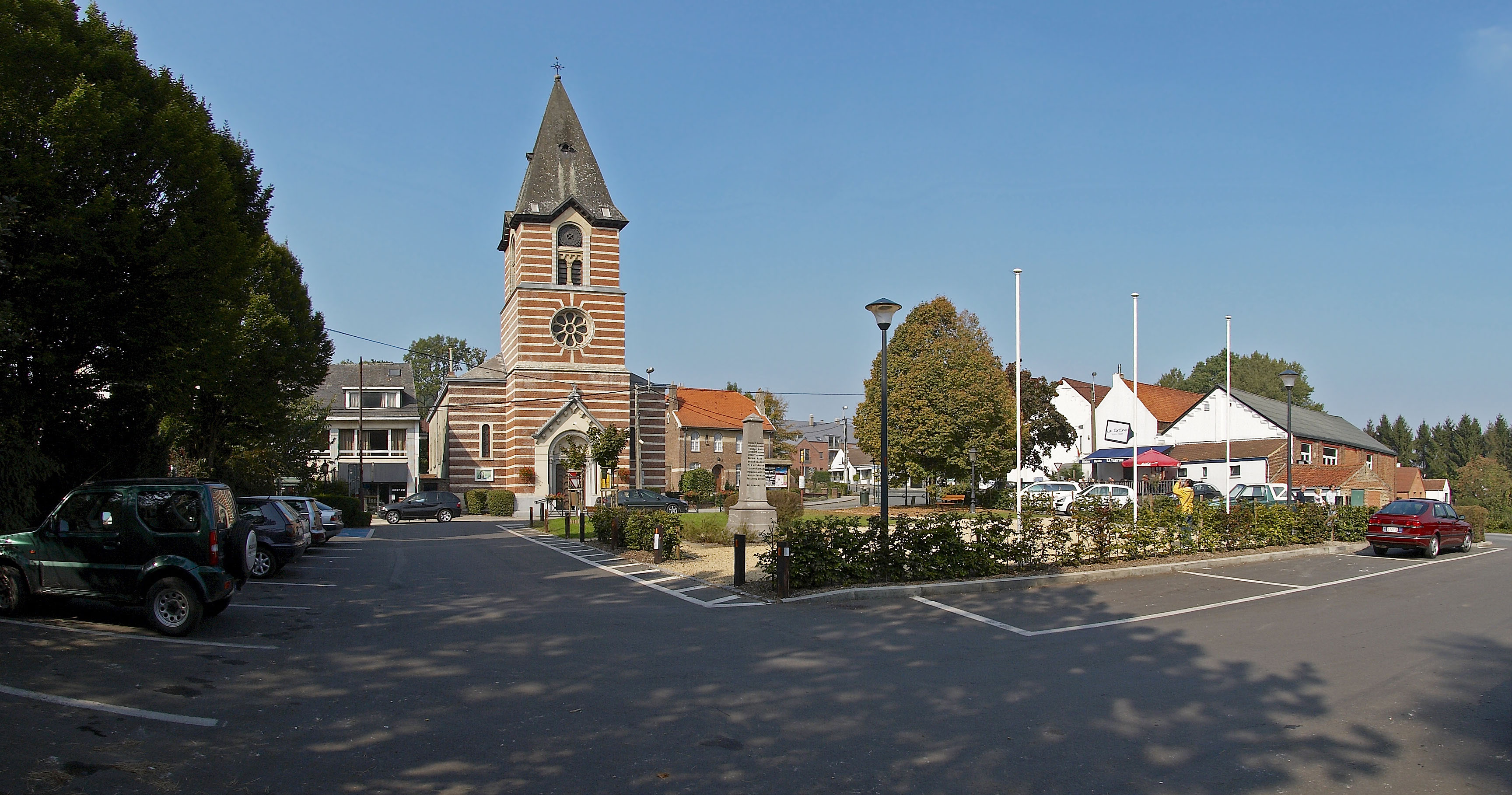 Sainte Gertrude kerk in Lasne